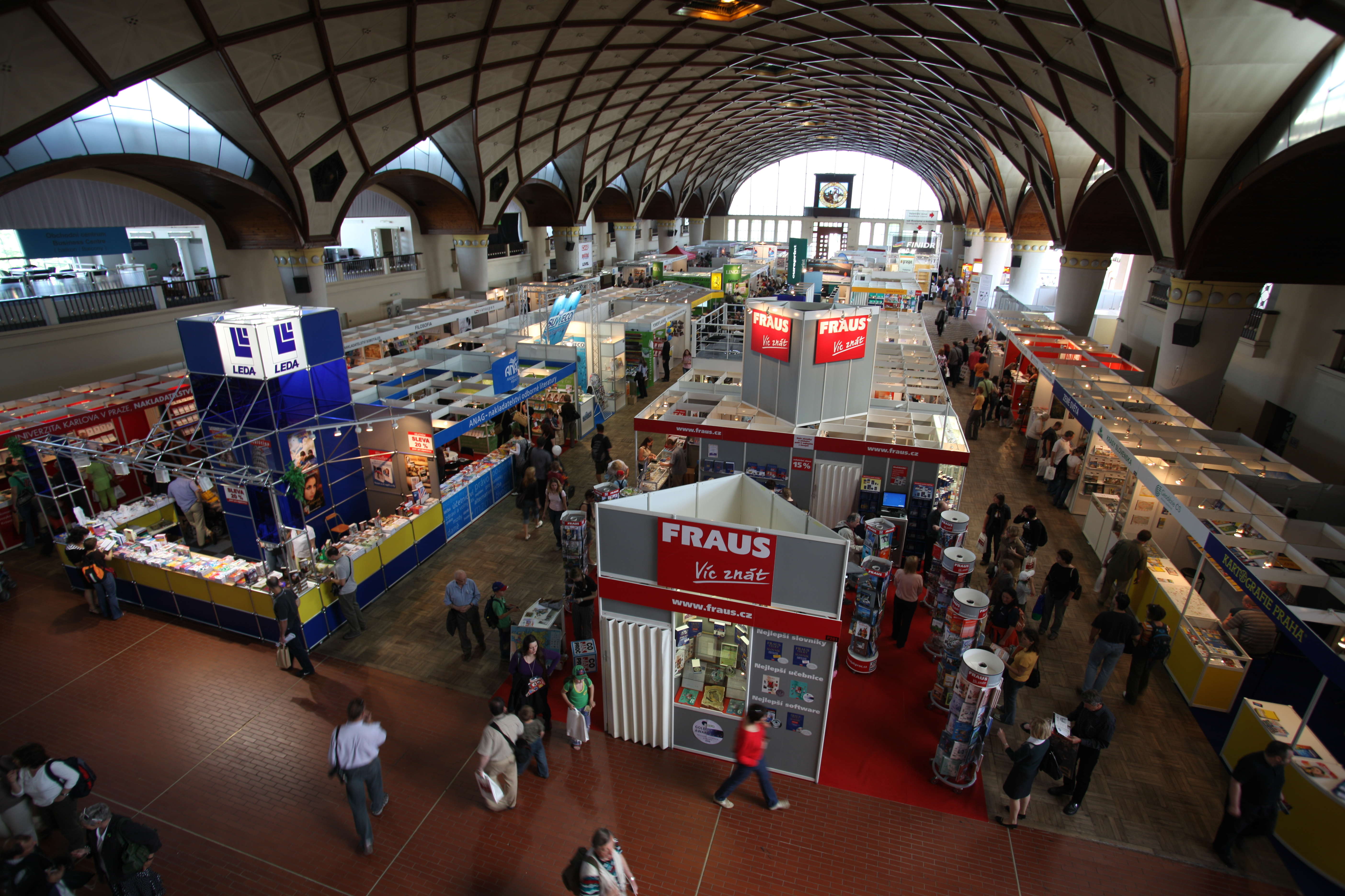 Česky: Výstava Svět knihy 2009 v pravém křídle Průmyslového paláce